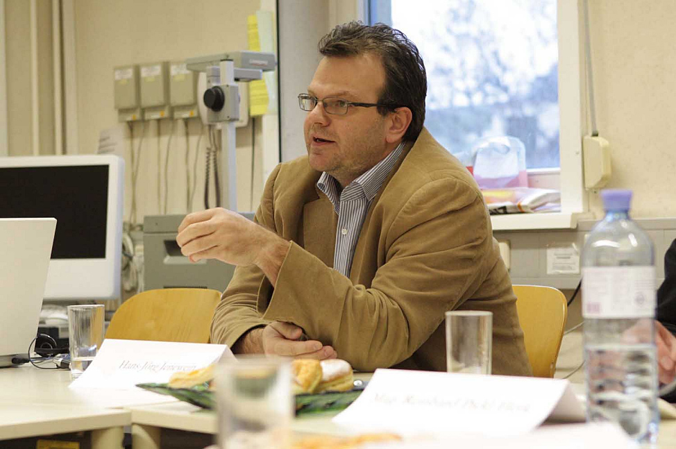 Hans-Jörg Jenewein, österreichischer Politiker (FPÖ). Bundesrat und Landesparteisekretär der FPÖ Wien. Aufgenommen beim Expertengespräch zum Thema „Politik/Macht/Medien“ am 3.März 2011. Veranstalter: Fachzeitschrift "Medienimpulse" in Kooperation mit dem Institut für Publizistik- und Kommunikationswissenschaft der Universität Wien.